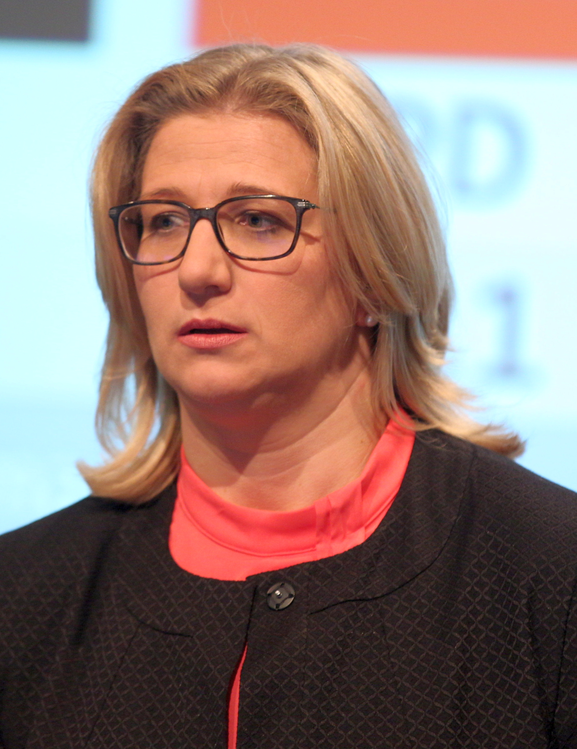 Anke Rehlinger (SPD) beim Wahlabend zur Landtagswahl im Saarland